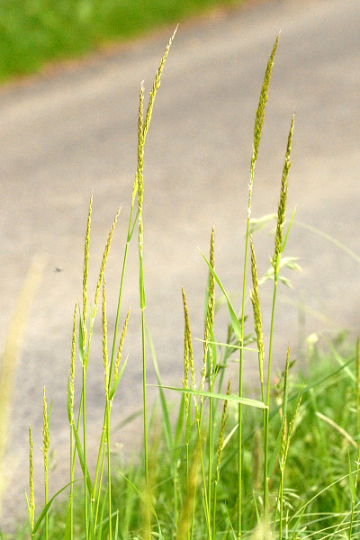 Trisetum flavescens from Commanster, Belgian High Ardennes .